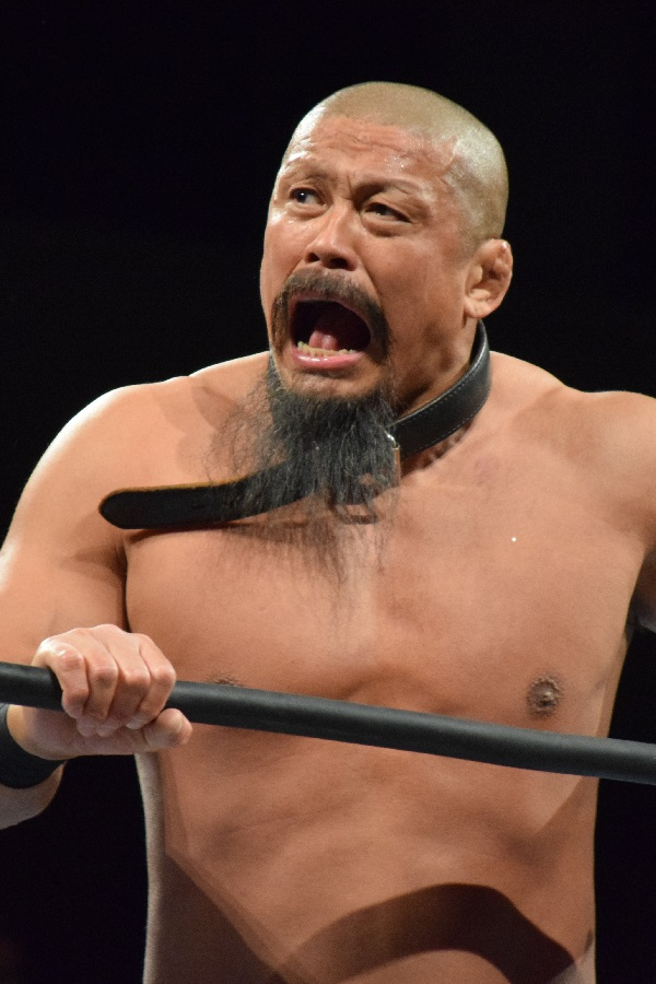 2017年3月12日 ベイコム総合体育館 「NEW JAPAN CUP 2017」 飯塚高史